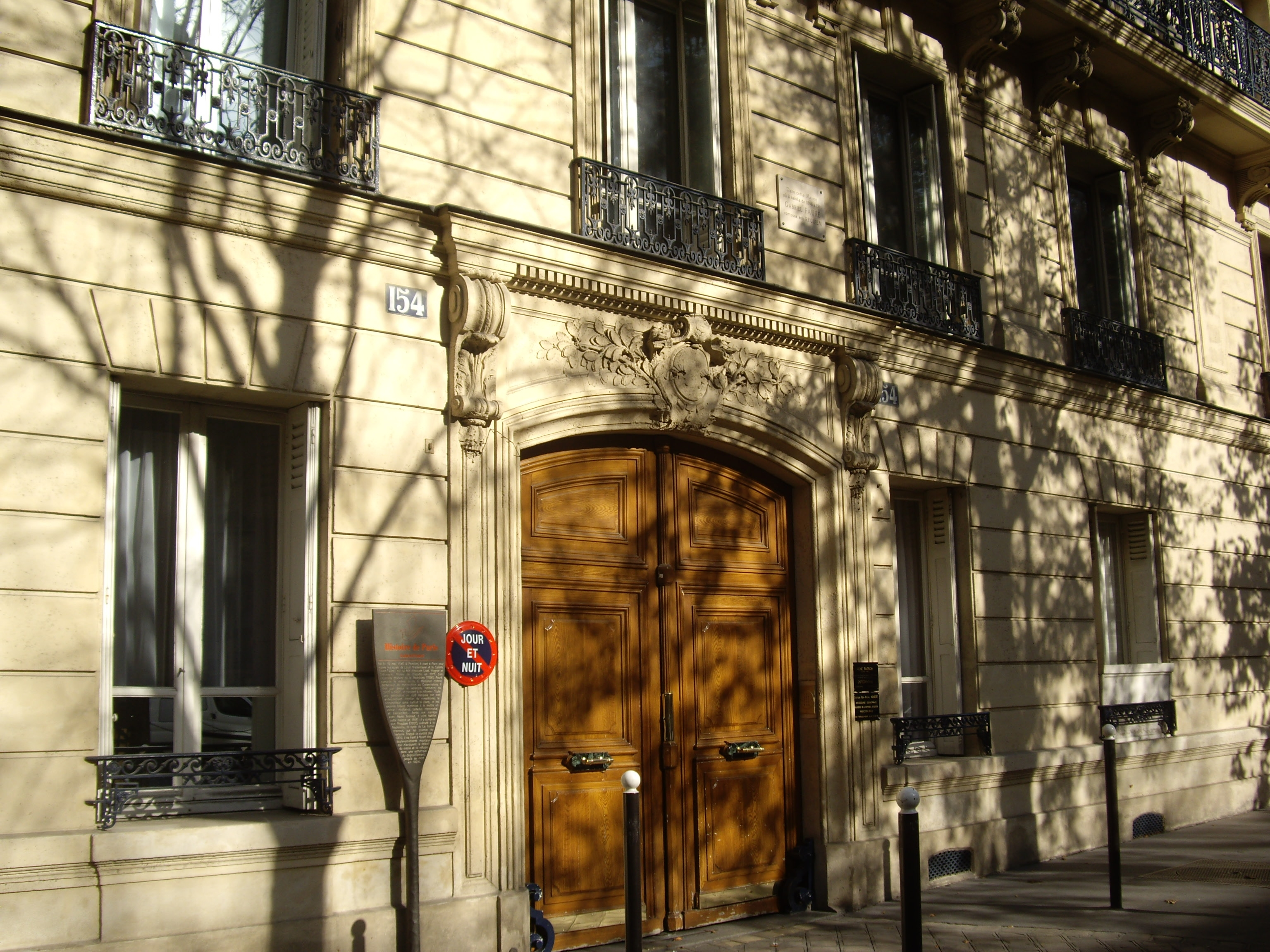 Immeuble au n° 154 boulevard Malesherbes où habita Gabriel Fauré.